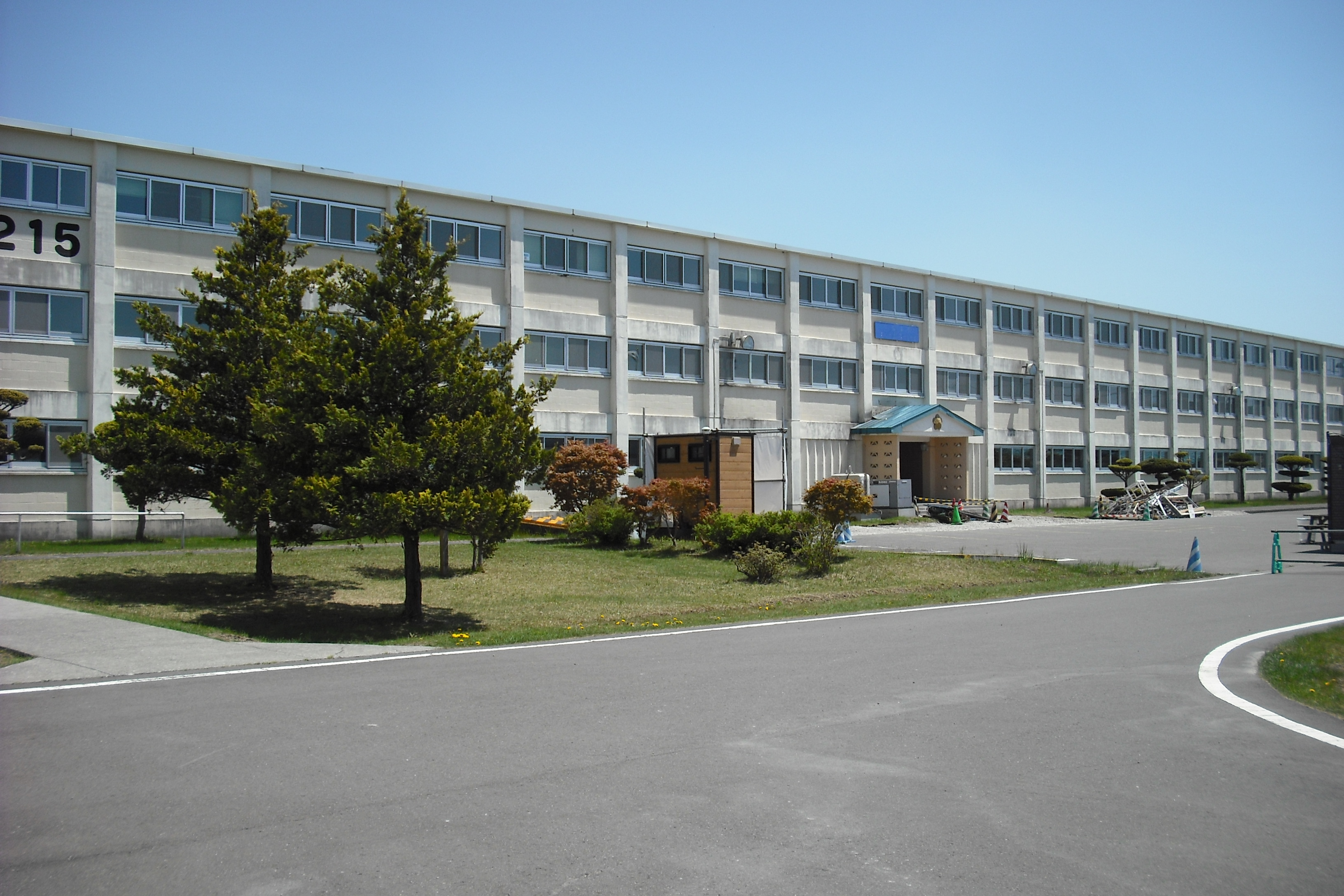 北教連本部隊舎（旧第1陸曹教育隊）、撮影当時は改築中。後の北部方面混成団本部隊舎として使用予定